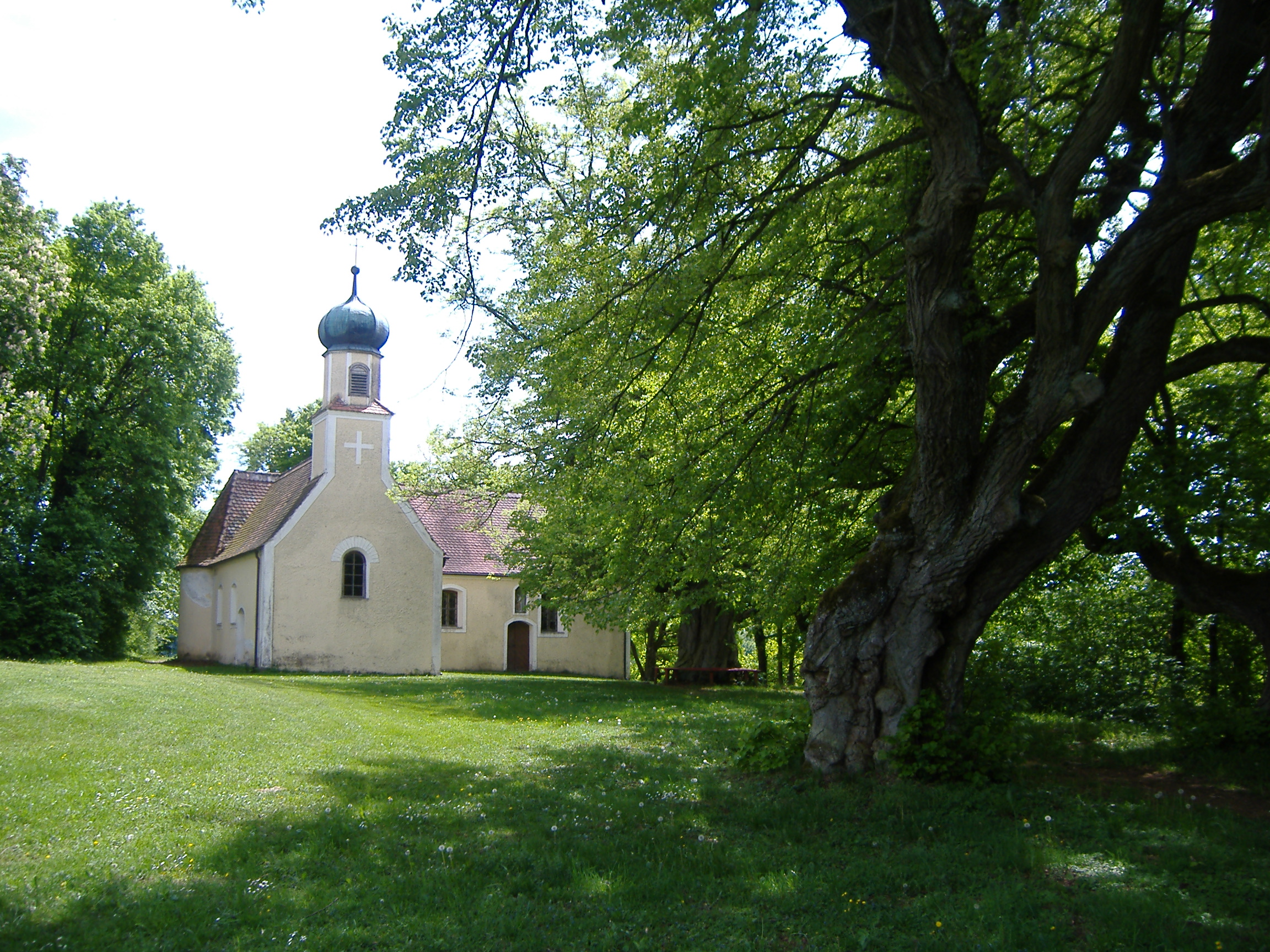 Kapellen auf dem Antoniberg bei Stepperg